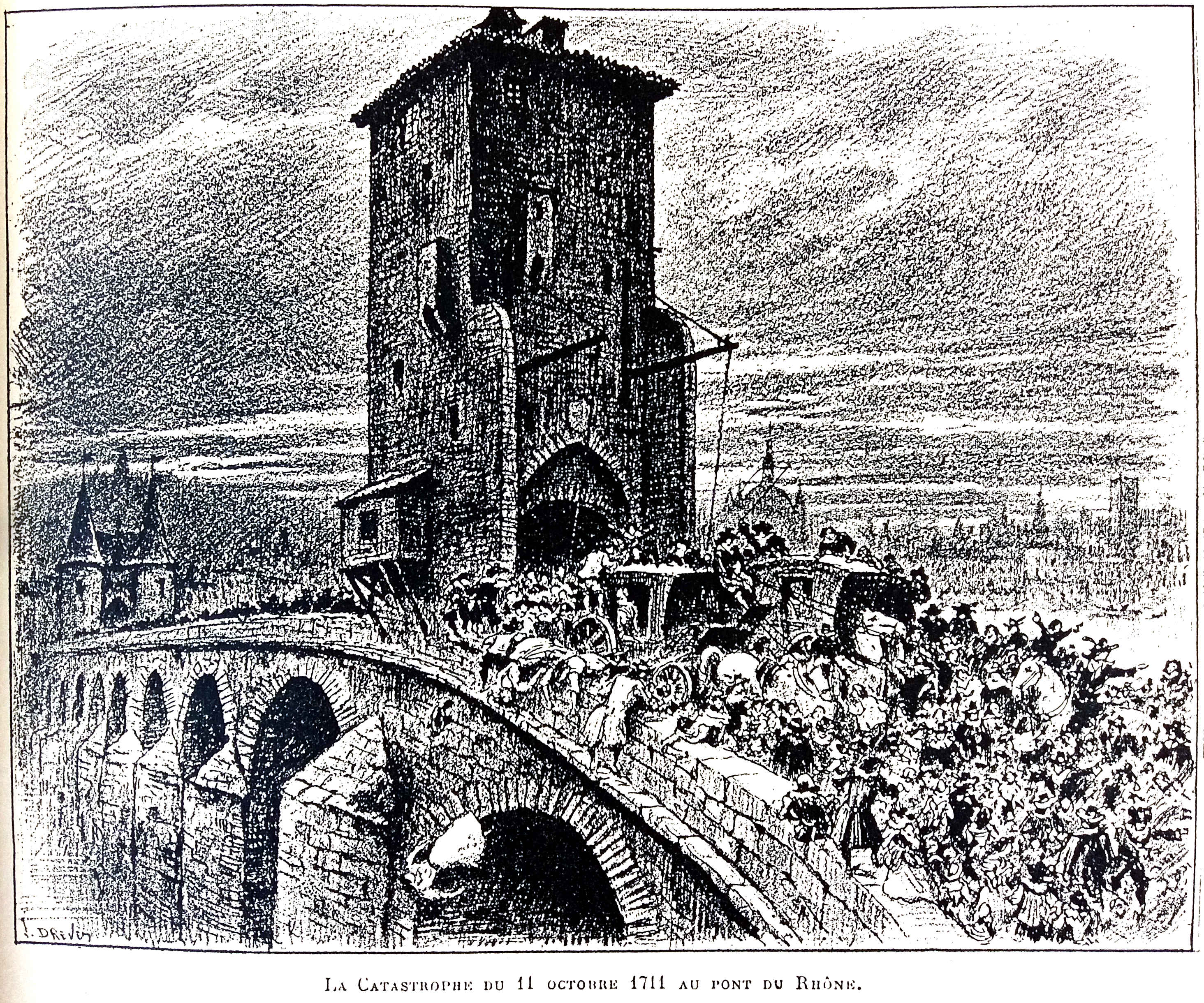 Livre Le Lyon de nos pères, Emmanuel Vingtrinier et Joannès Drevet, 1901, page 15 (dessin de Joannès Drevet) : la catastrophe du 11 octobre 1711 au pont du Rhône. Bibliothèque municipale de Lyon.